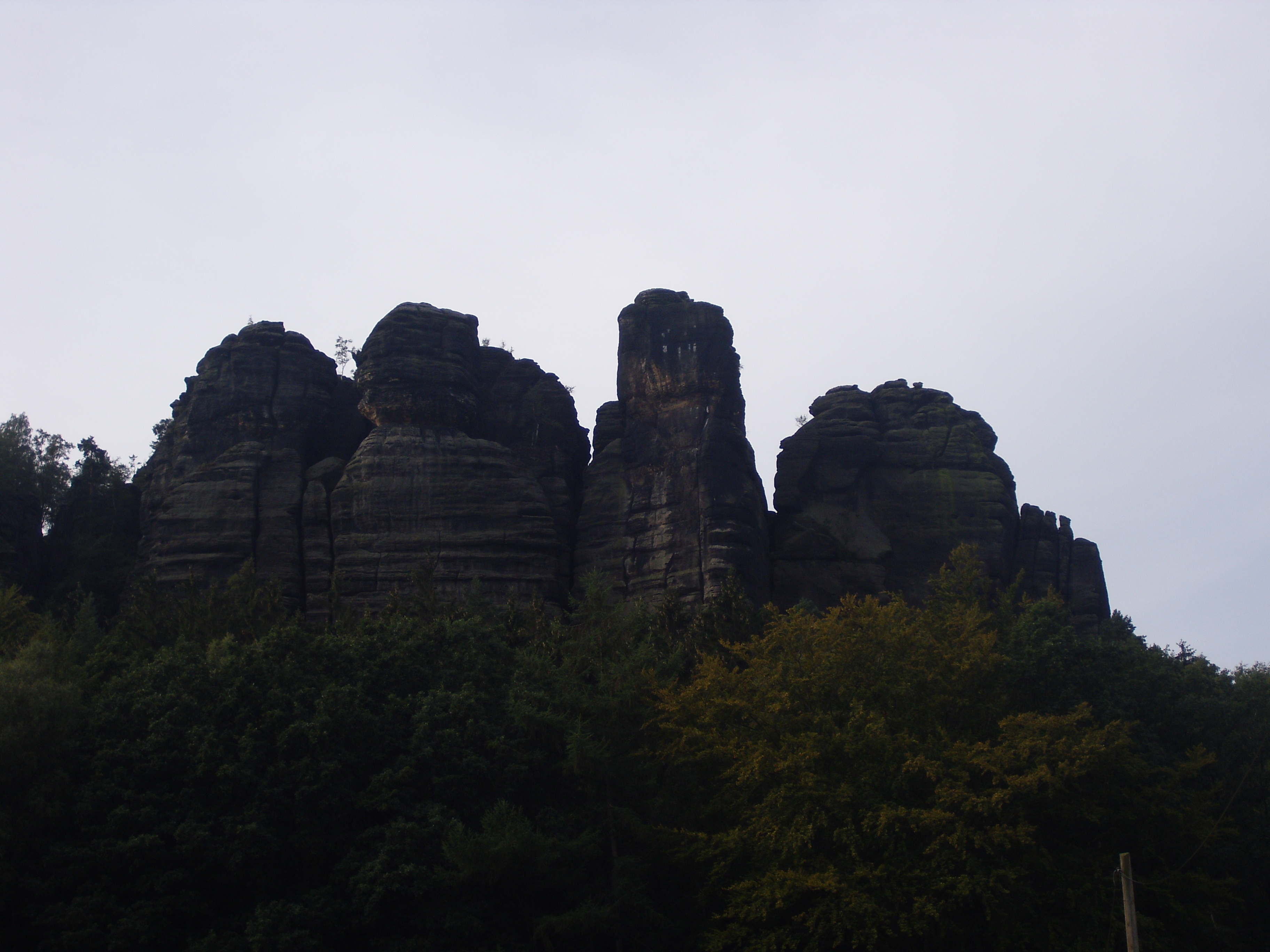 Blick von Norden auf den Pfaffenstein. Die Drei Felsen Ganz rechts von links: Glatter Turm, Nordturm, Raue Zinne. Ganz links Aufstieg zum Nadelöhr zu erkennen